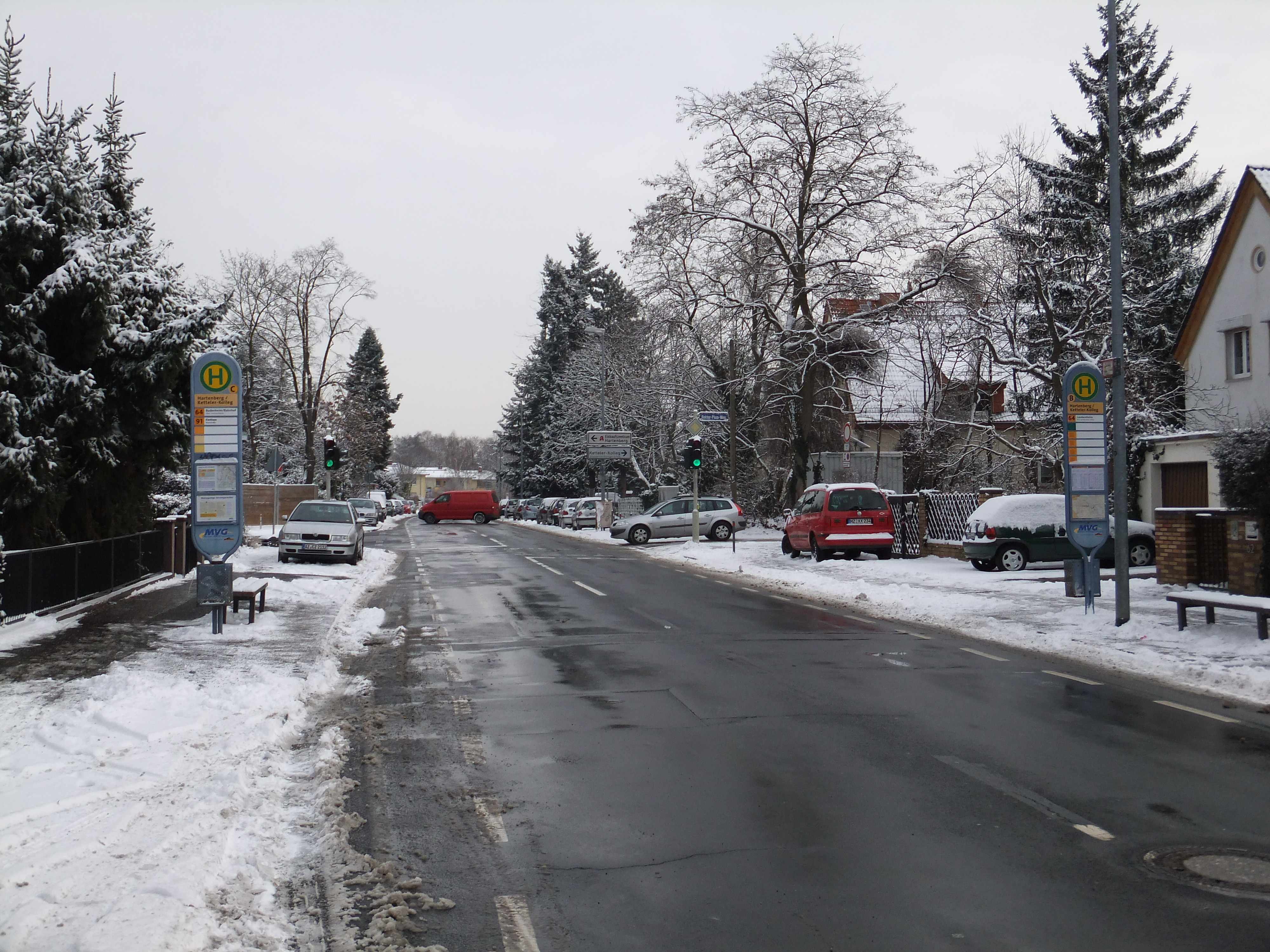 Die Bushaltestellen Hartenberg/Ketteler-Kolleg in Mainz auf der Straße Am Fort Gonsenheim